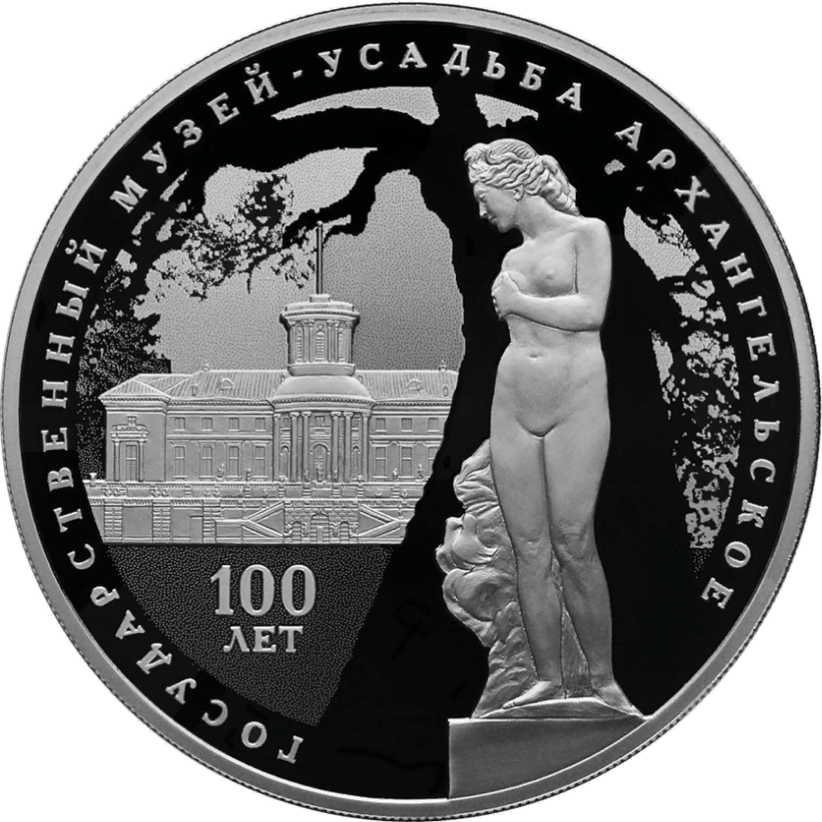 Монета Банка России. Серия: 100-летие основания Государственного музея-усадьбы «Архангельское». Скульптура «Венера с голубками». 3 рубля, серебро, реверс, пруф. Рельефные изображения южного фасада дворца; на фоне дерева — рельефное изображение скульптуры «Венера с голубками», украшающей лестницу между террасами; надписи — вдоль канта: «ГОСУДАРСТВЕННЫЙ МУЗЕЙ-УСАДЬБА АРХАНГЕЛЬСКОЕ», внизу слева: «100 ЛЕТ». Чеканка — Санкт-Петербургский монетный двор. Художник: А.А. Брынза. Скульптор: А.Н. Бессонов.